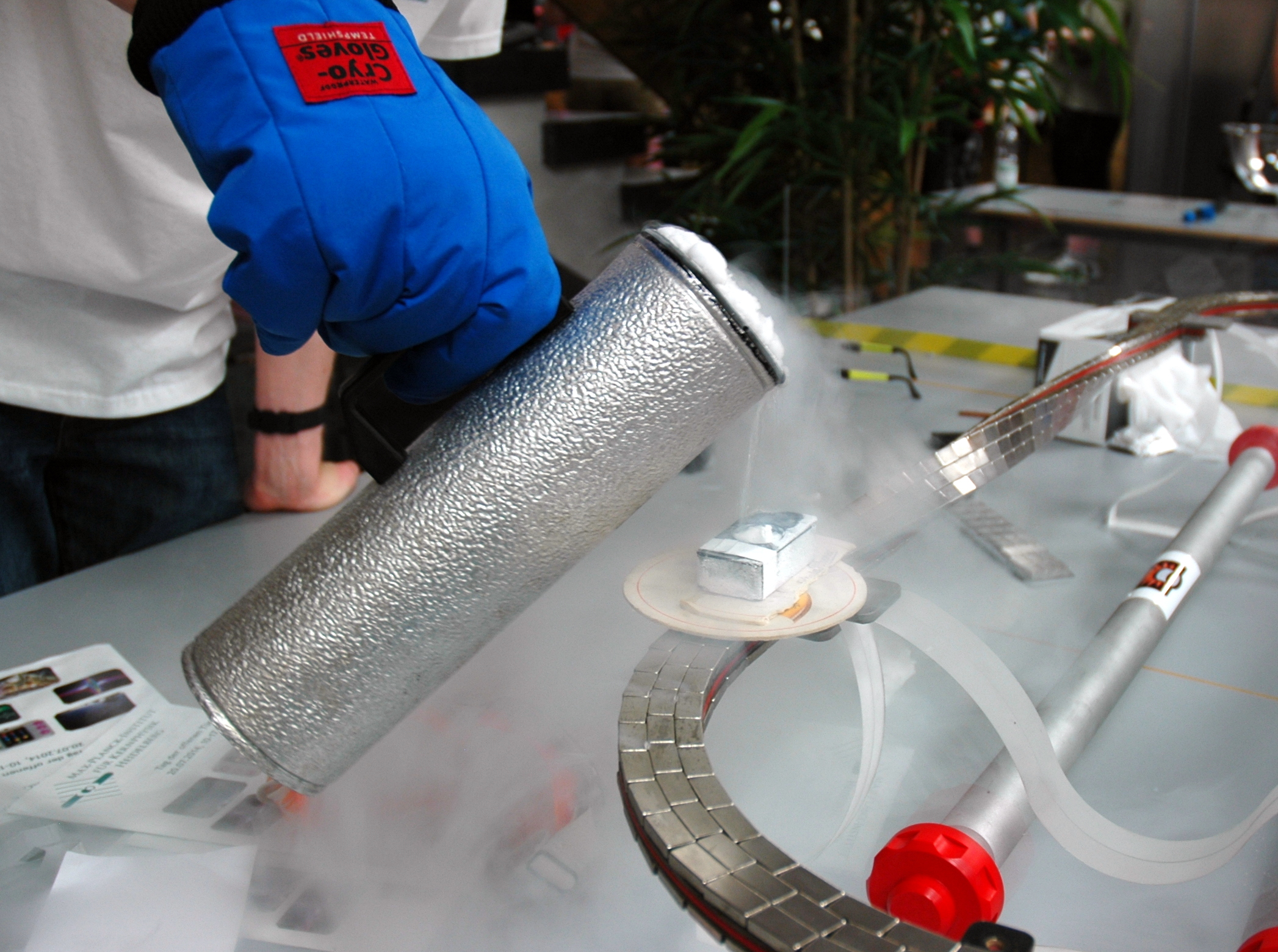 Max Planck Institute for Nuclear Physics. Tag der offenen Tür.